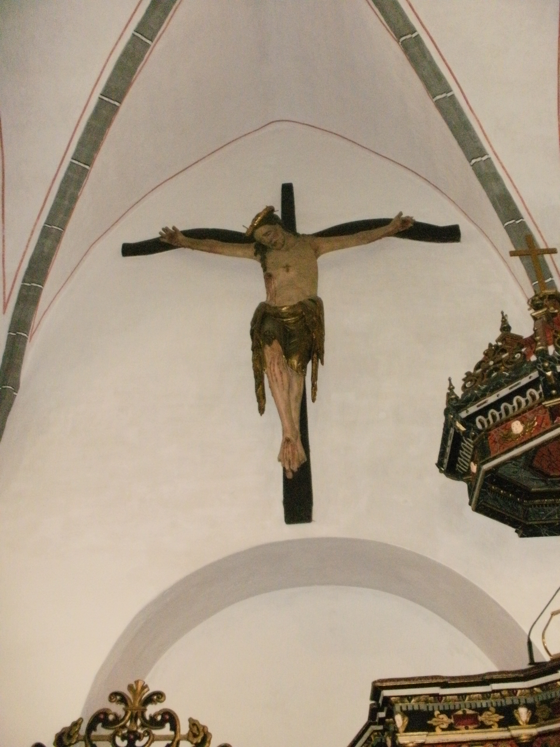 Hölzernes Kruzifix in der Klosterkirche Cottbus